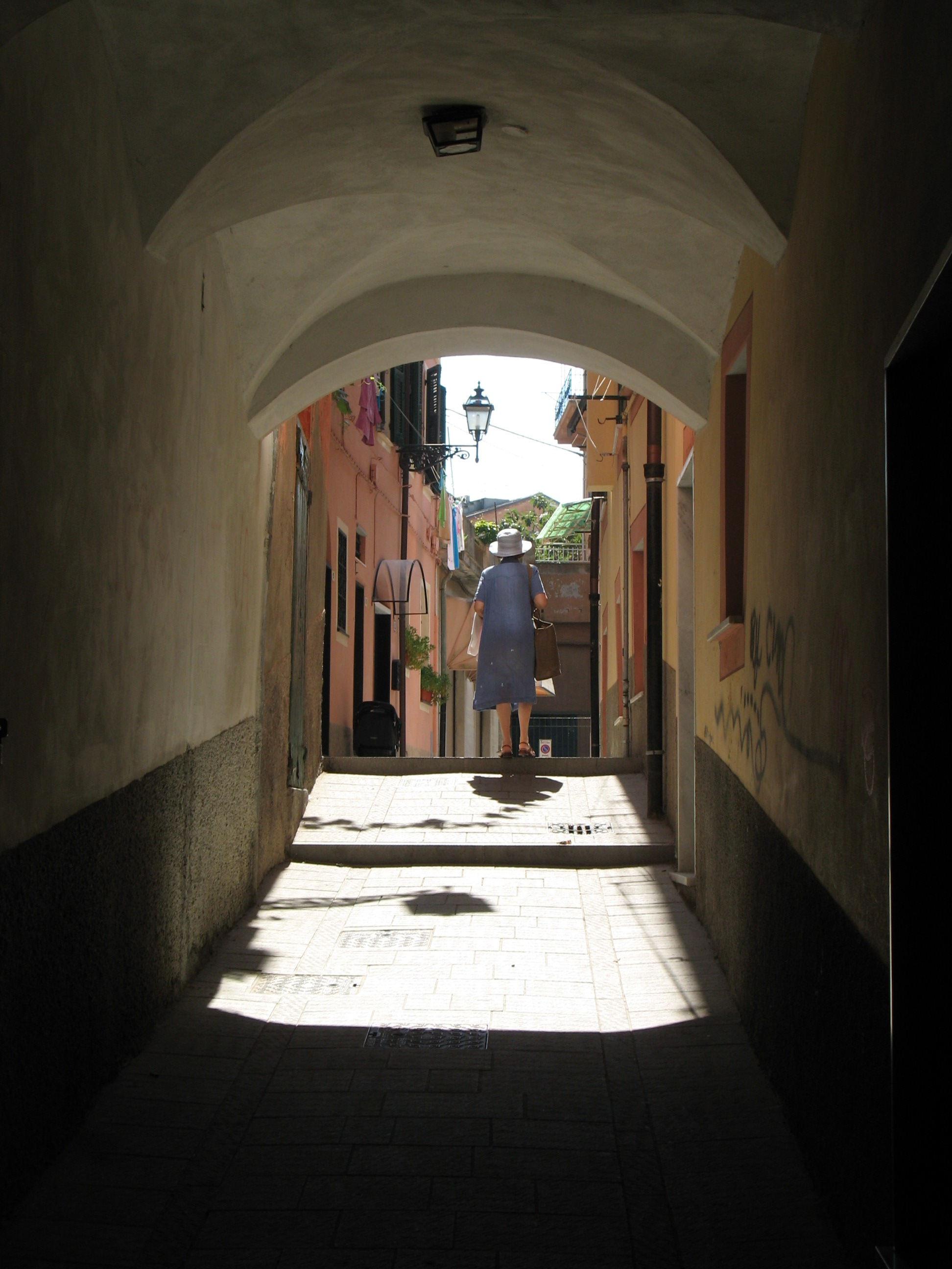 Immagine da Sestri Levante